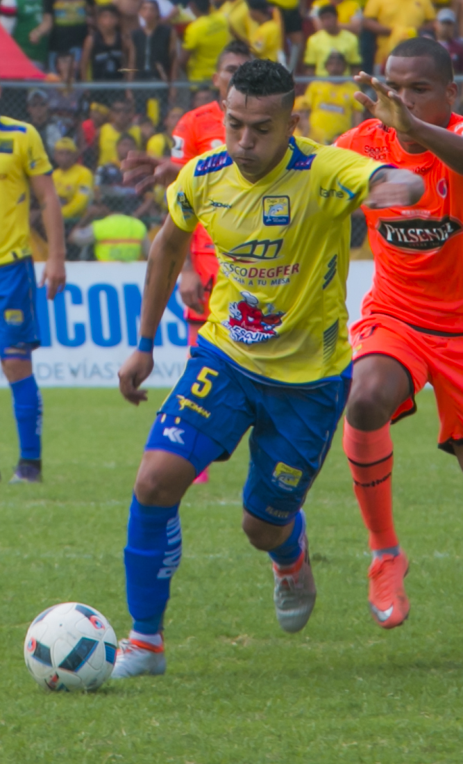 Flavio Caicedo jugando para Delfín de Manta en el 2016